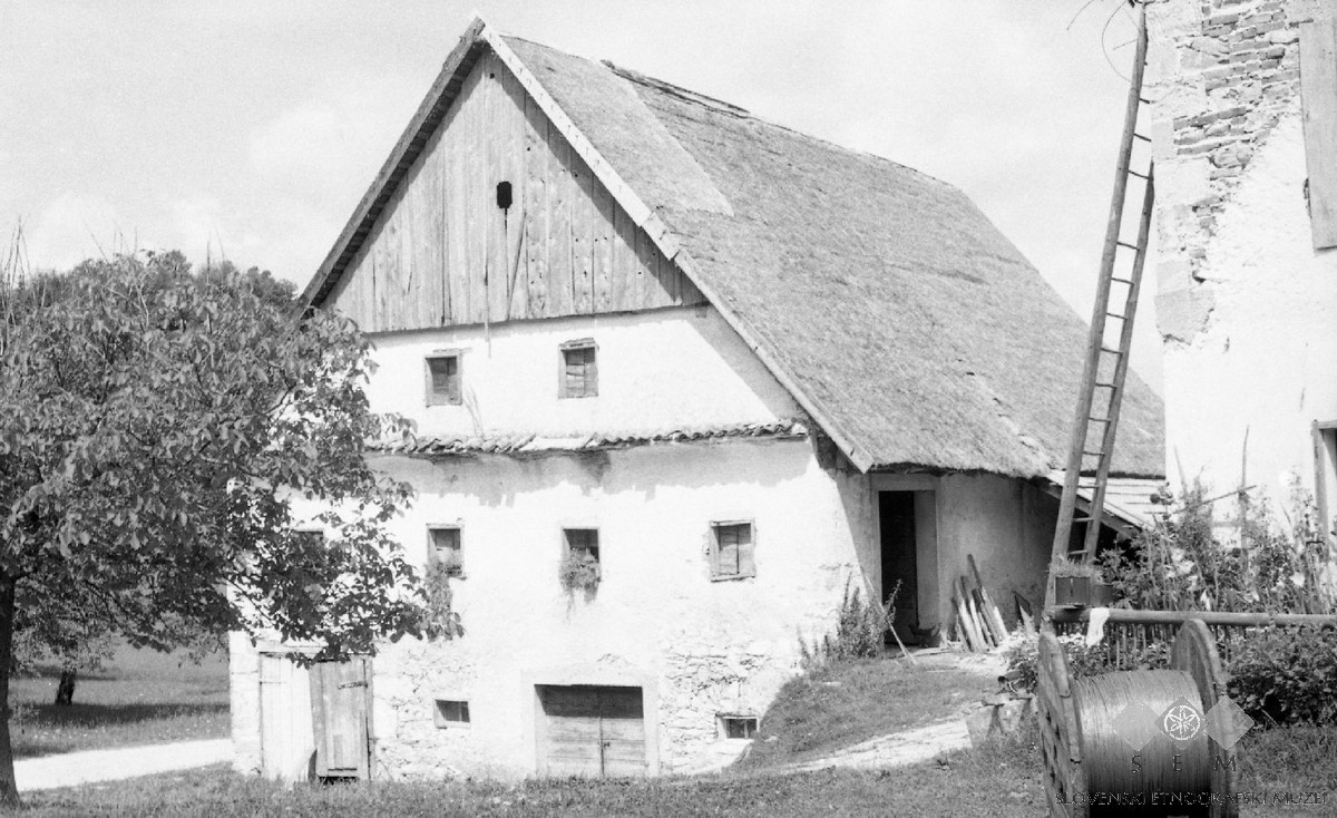 Trnovčeva štala (hlev) z letnico 1865, Zgornje Lome.